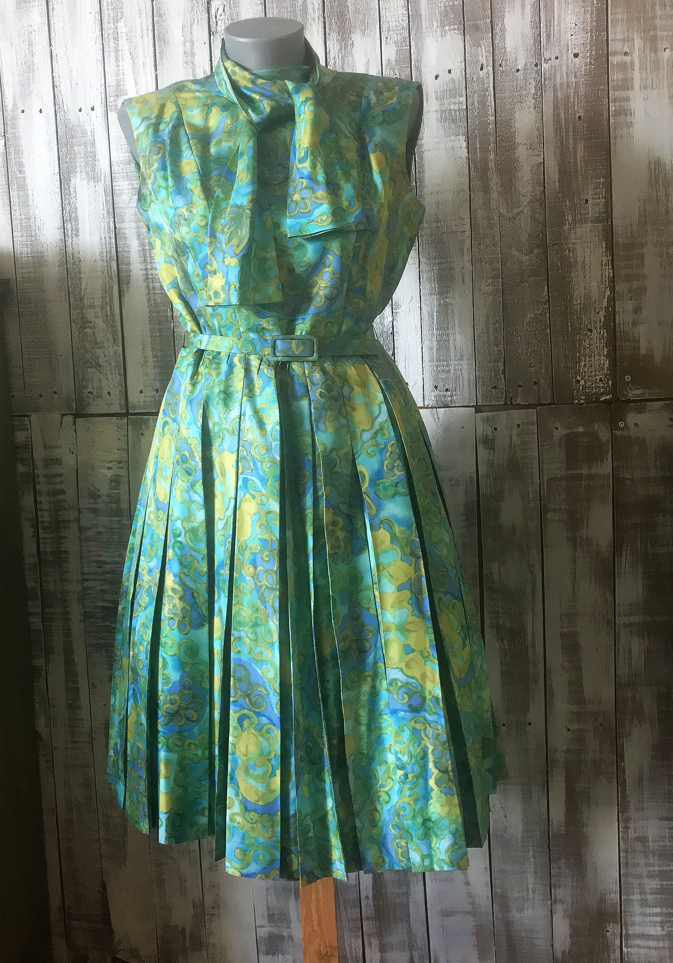 Dámské šaty ze salonu Pierre Balmain z roku 1964 z čistého hedvábí se zajímavým potiskem a skládanou sukní